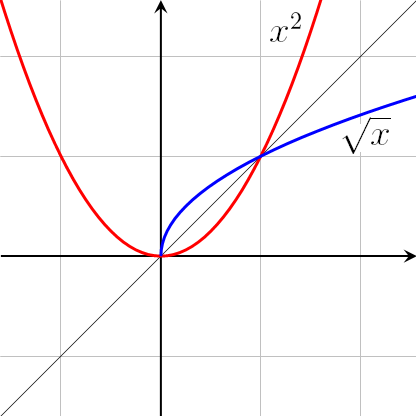 A graph of y = x2 and y = /